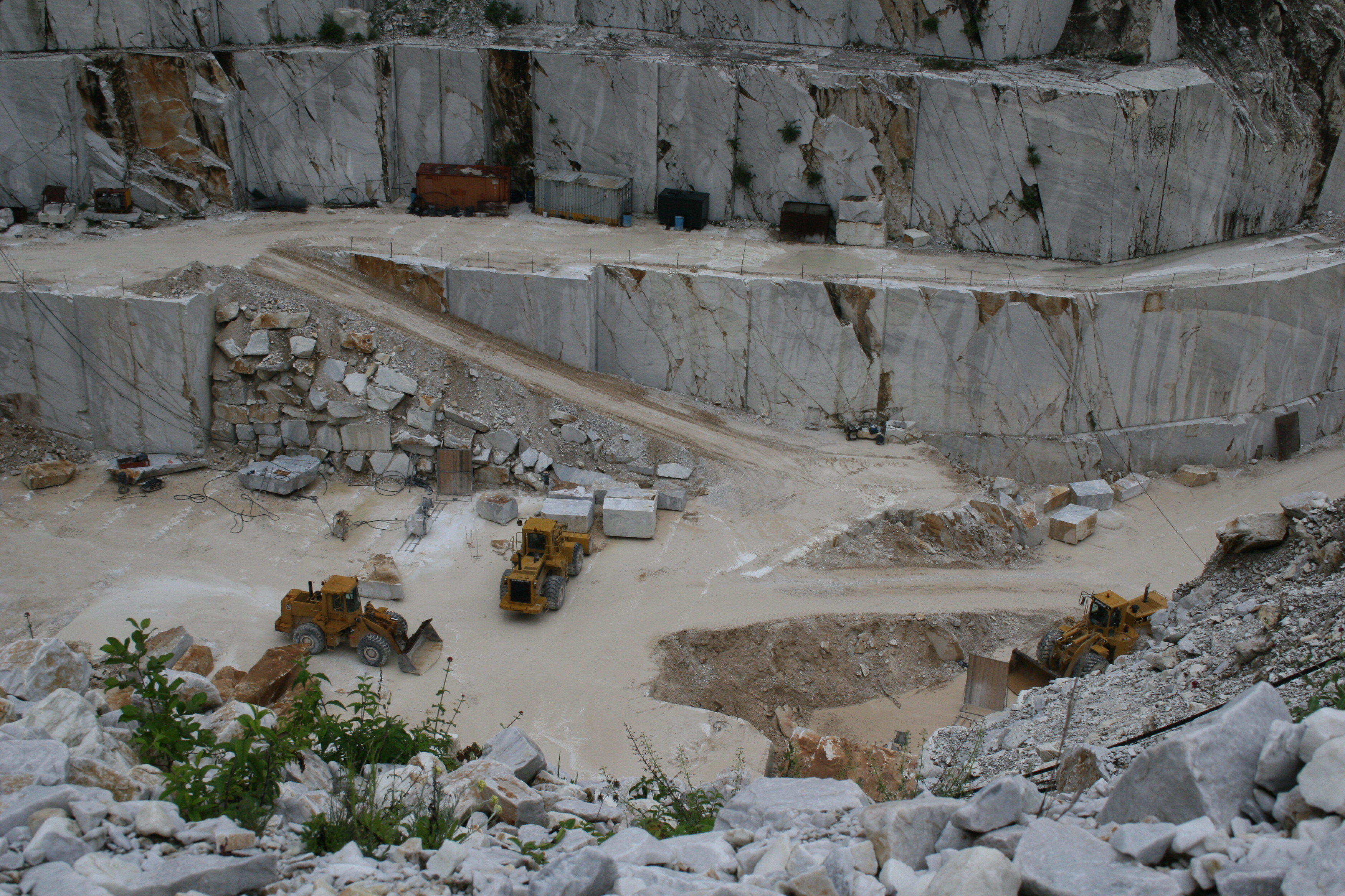 Marmorsteinbruch bei Carrara mit Radladern.